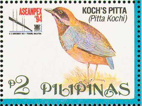 Erythropitta kochi